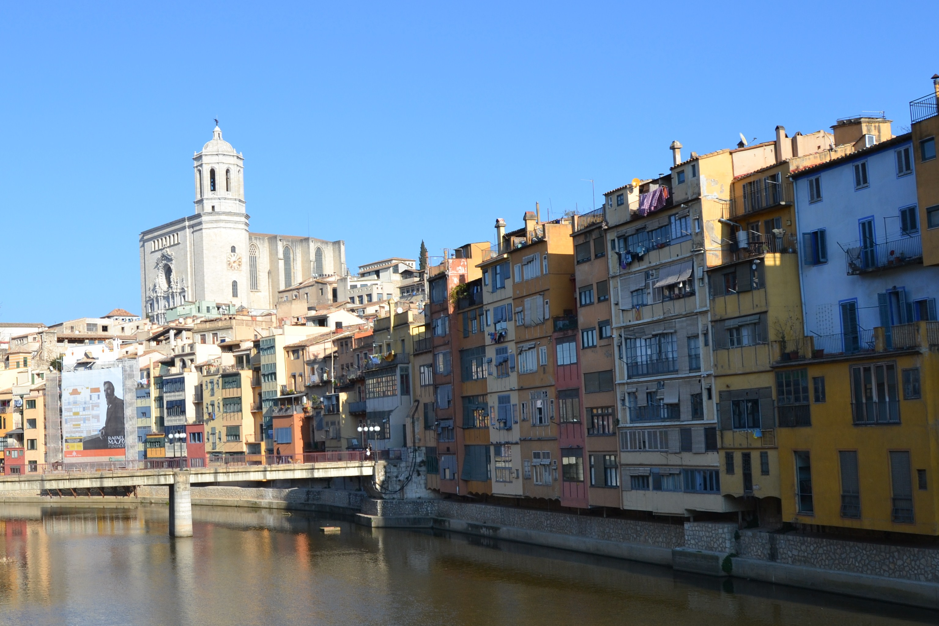 Girona i la seva catedral des del Pont de les peixateries velles. Catalonia, Spain